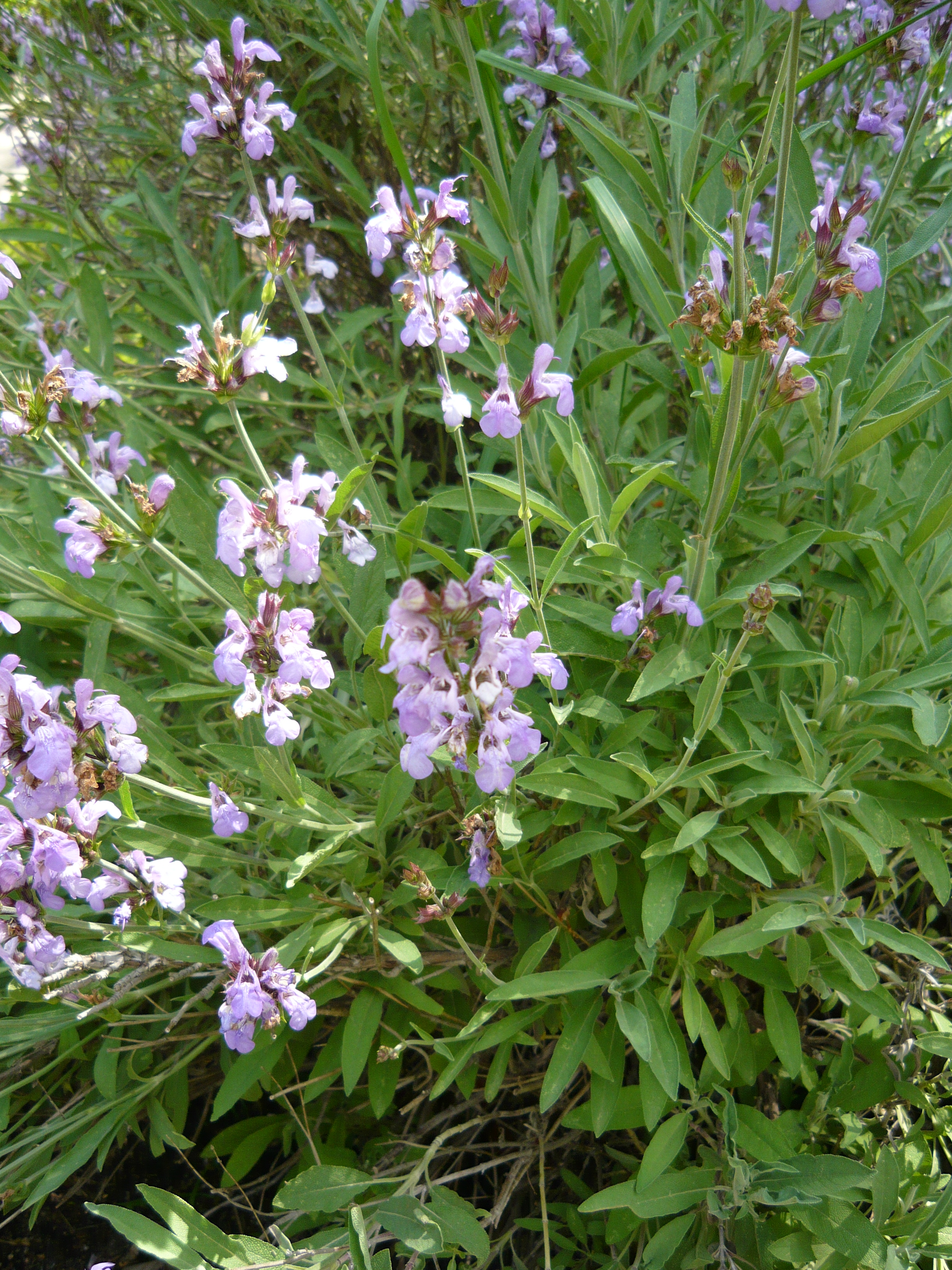 Salvia lavandulifolia. Real Jardín Botánico de Madrid.